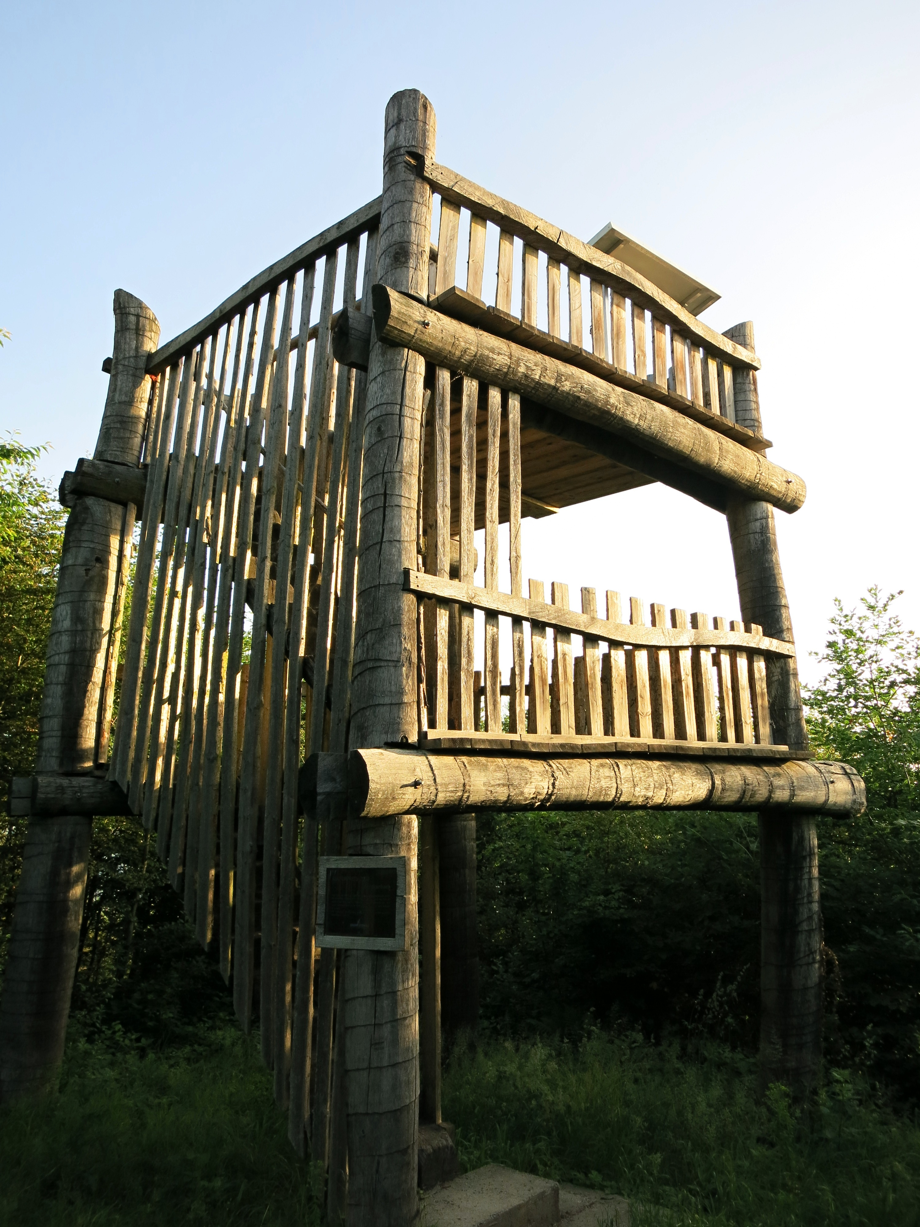 Kapfturm